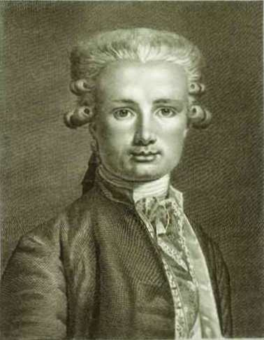 French poet Ange-François Fariau de Saint-Ange (1747-1810)